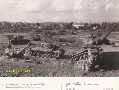 6eme Dragons, régiment de chars à Besançon